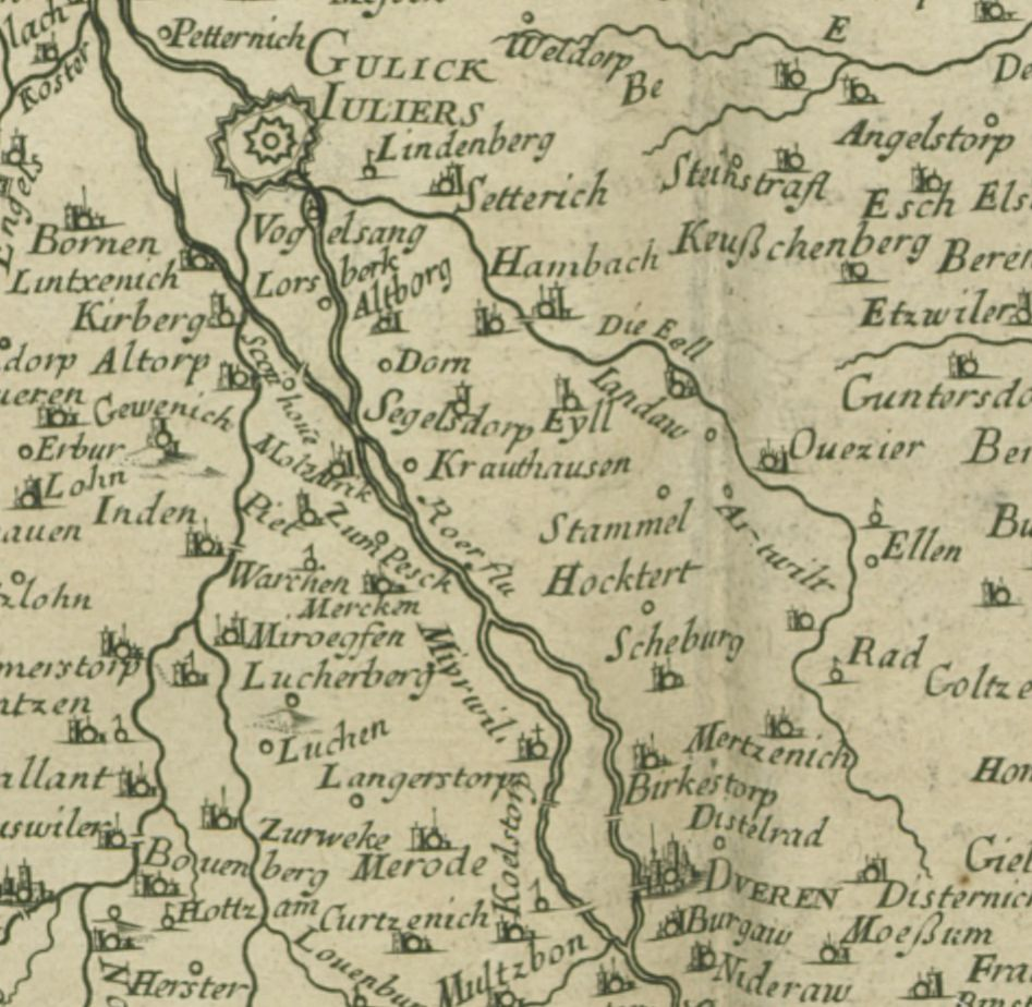 Kartenausschnitt aus der Historischen Karte von 1681, Herzogtum Jülich und Andere